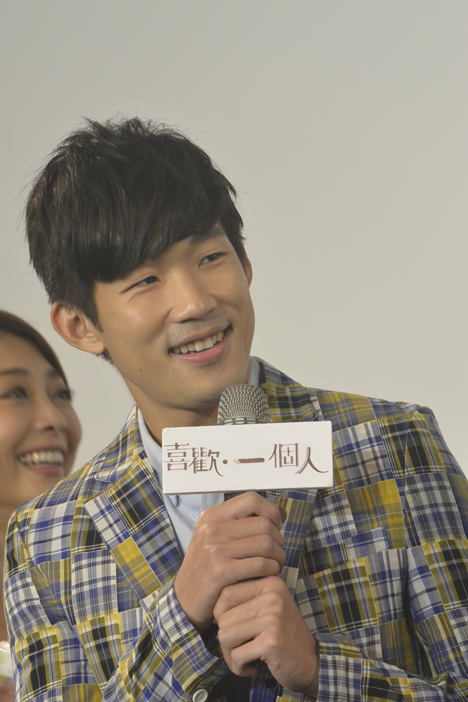 中文（台灣）: 喜歡．一個人《最終回》粉絲見面會